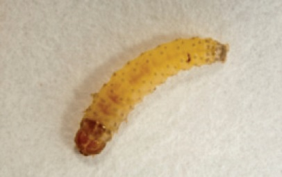 Leucinodes laisalis